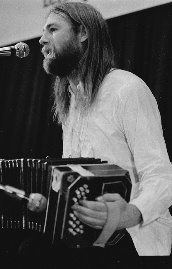 Leipziger Liederszene, Dieter Kalka am Bandoneon, Foto: Jochen Janus.